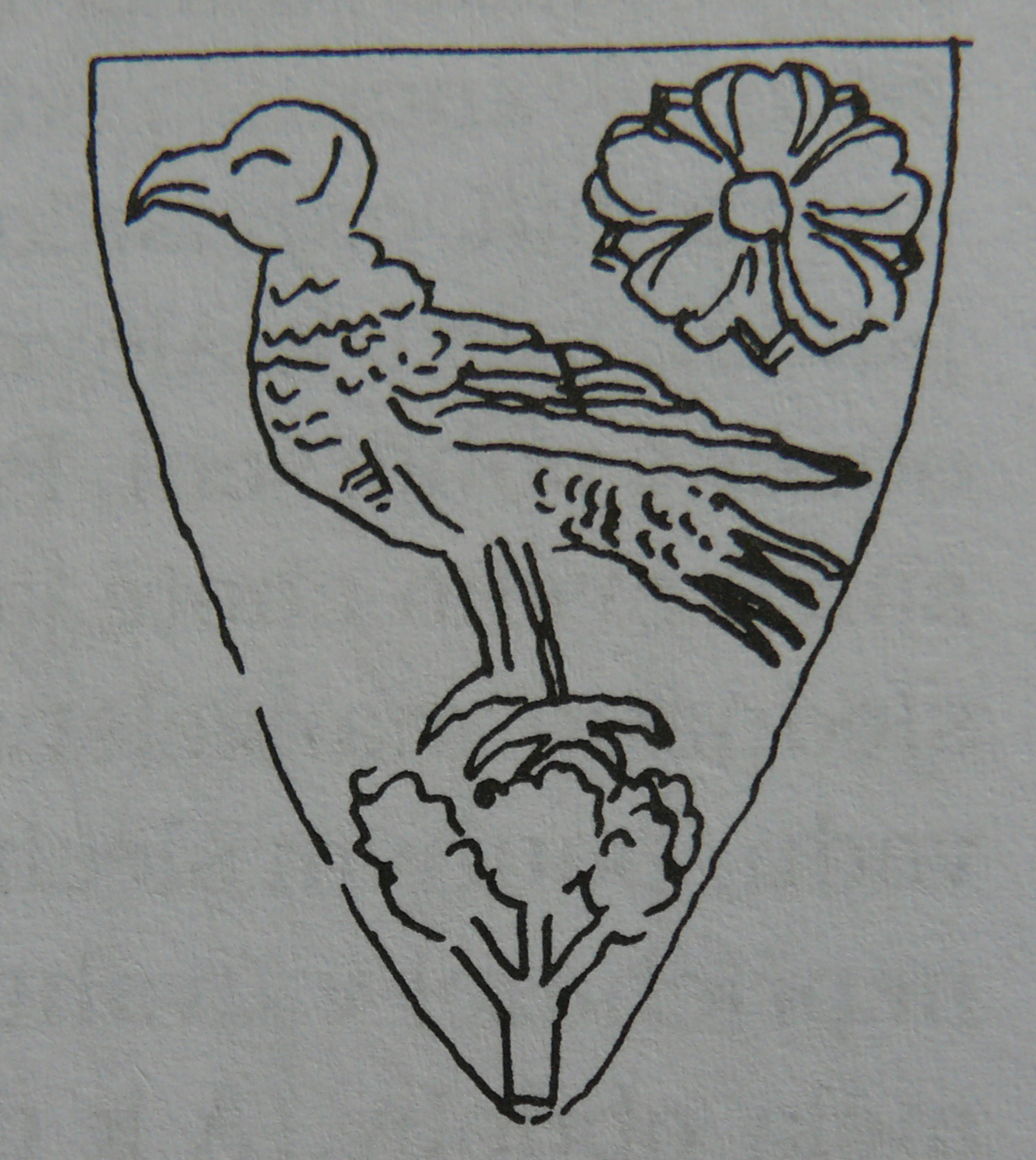 Pečeť Záviše z Falkenštejna